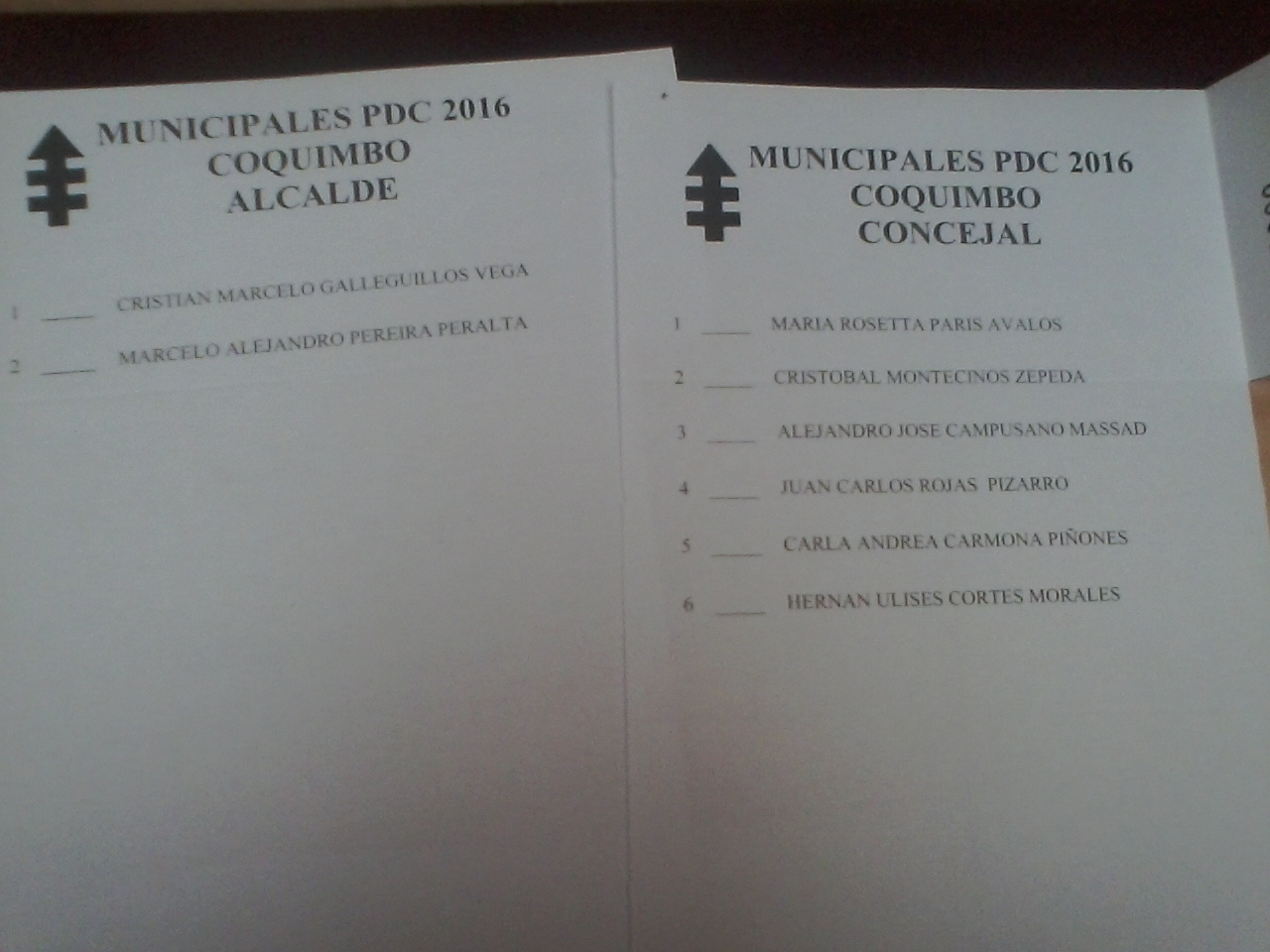 Votos de las elecciones primarias internas del Partido Demócrata Cristiano para alcalde y concejales en Coquimbo para las elecciones municipales de 2016.